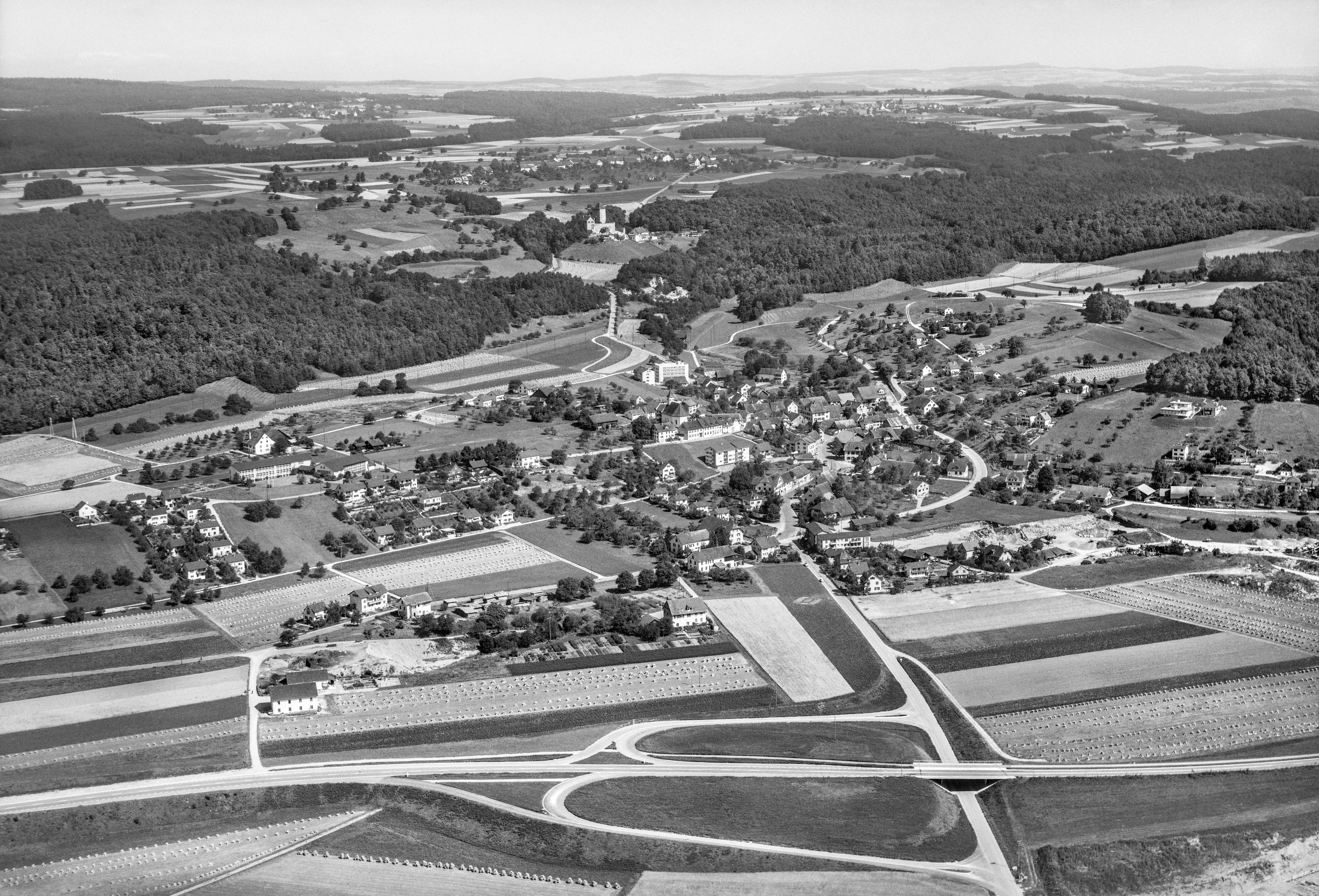 Herblingen (SH). Luftaufnahme 1962. Reiat mit den Gemeinden Stetten, Büttenhardt, Lohn. Schloss Herblingen.